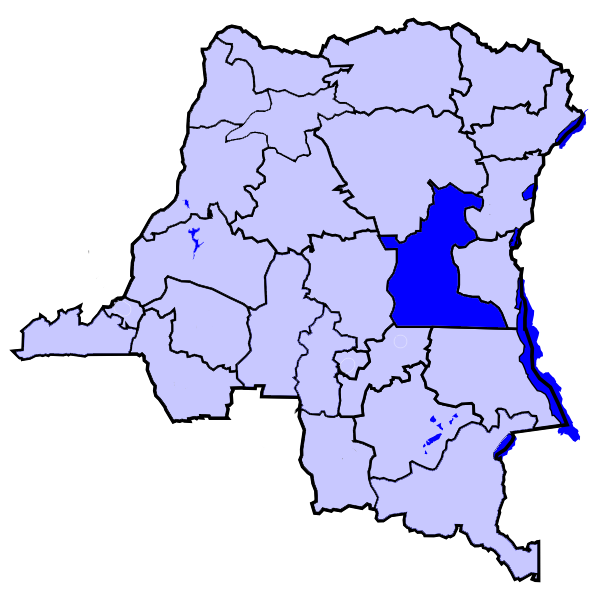 DR Kongo, karta, från engelska Wikipedia.